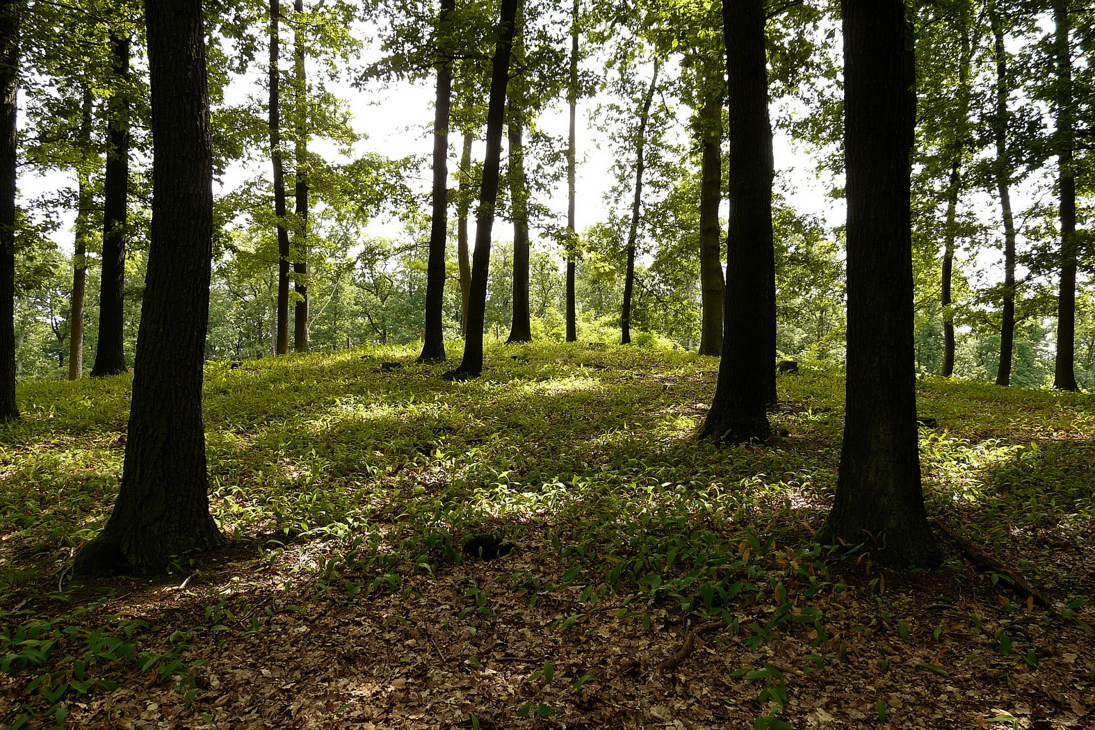 Vrchol Ostré hůrky